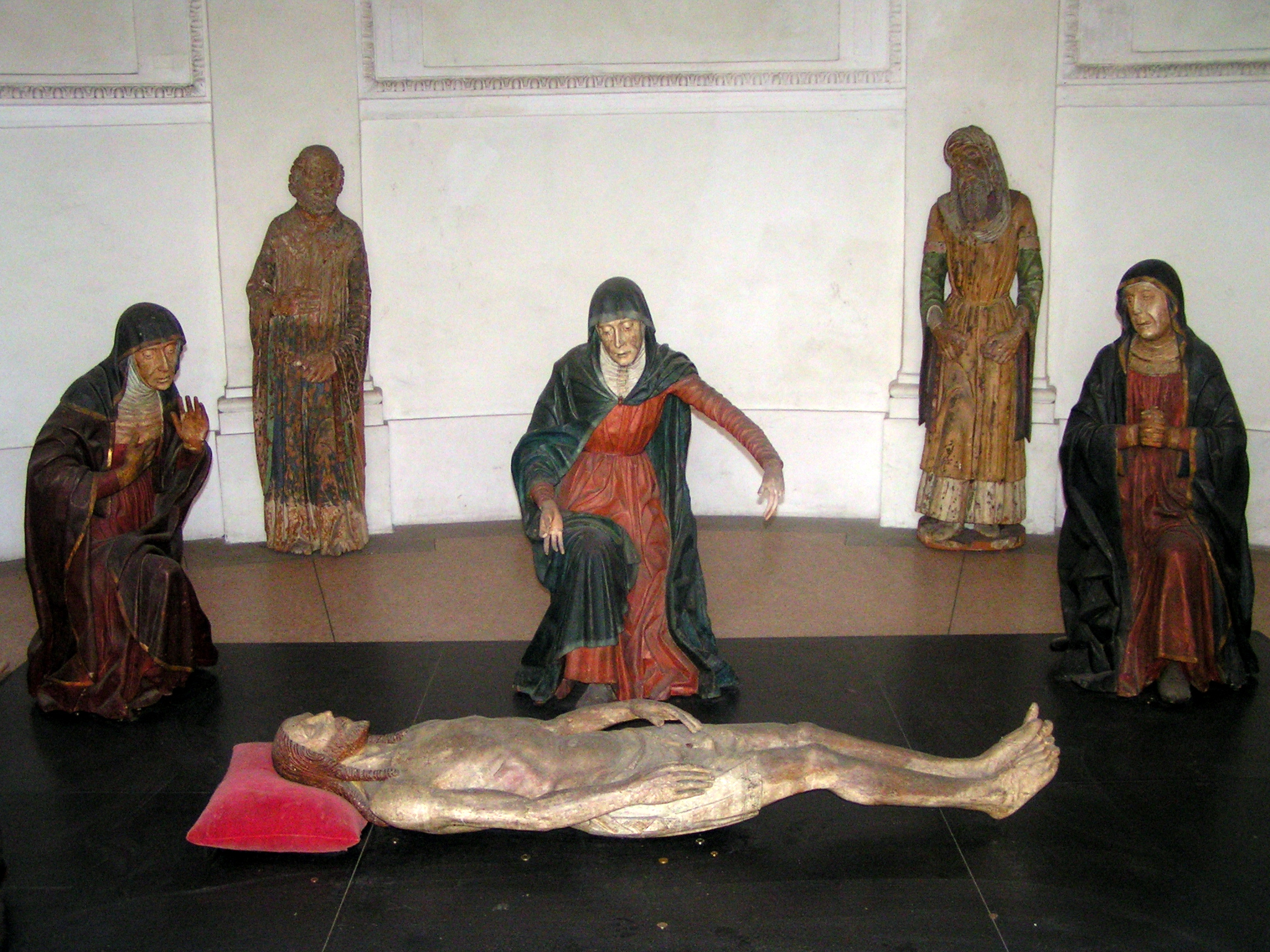 Compianto presso Santuario della Madonna del Sasso